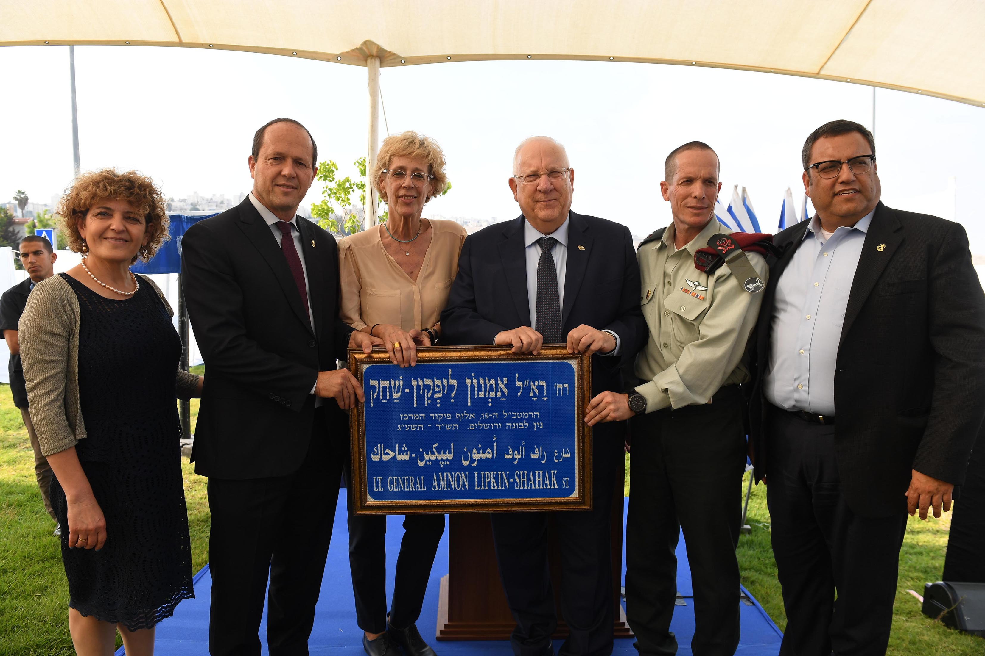 טקס הענקת שם לרחוב בירושלים על שמו של רב-אלוף במיל' אמנון ליפקין שחק בהשתתפות נשיא המדינה ראובן ריבלין, אלמנתו טלי ליפקין שחק וראש עיריית ירושלים ניר ברקת